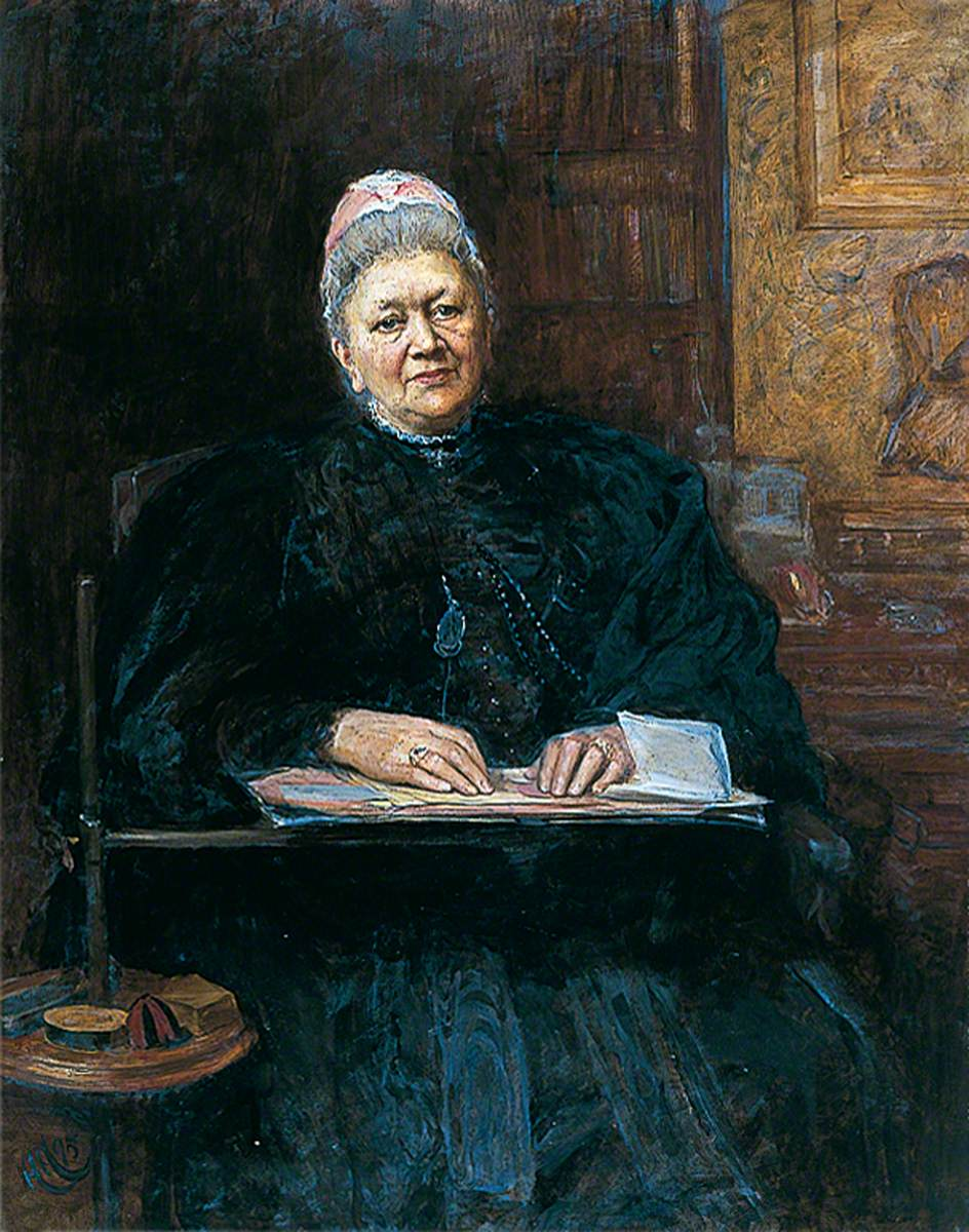 Mrs Phoebe Lankesterlabel QS:Len,"Mrs Phoebe Lankester"